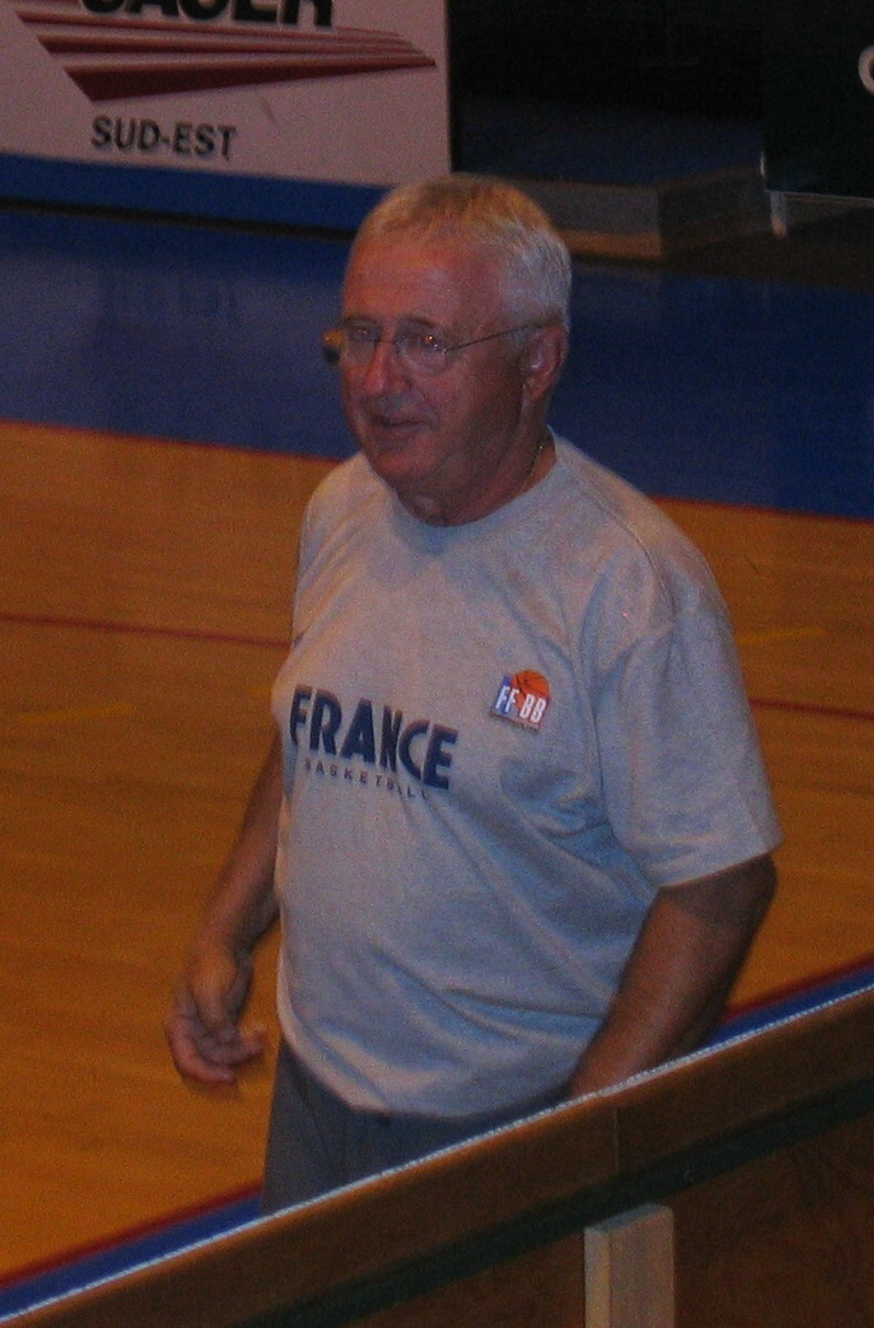 Photo d'Alain Jardel, entraîneur français de basket-ball prise par sanguinez lors du stage de préparation au championnat du monde de l'équipe de France féminine de basket-ball à Clermont-Ferrand fin juillet 2006. Personnal photo of Alain Jardel, french basketball coach, during the preparation for the 2006 world championship